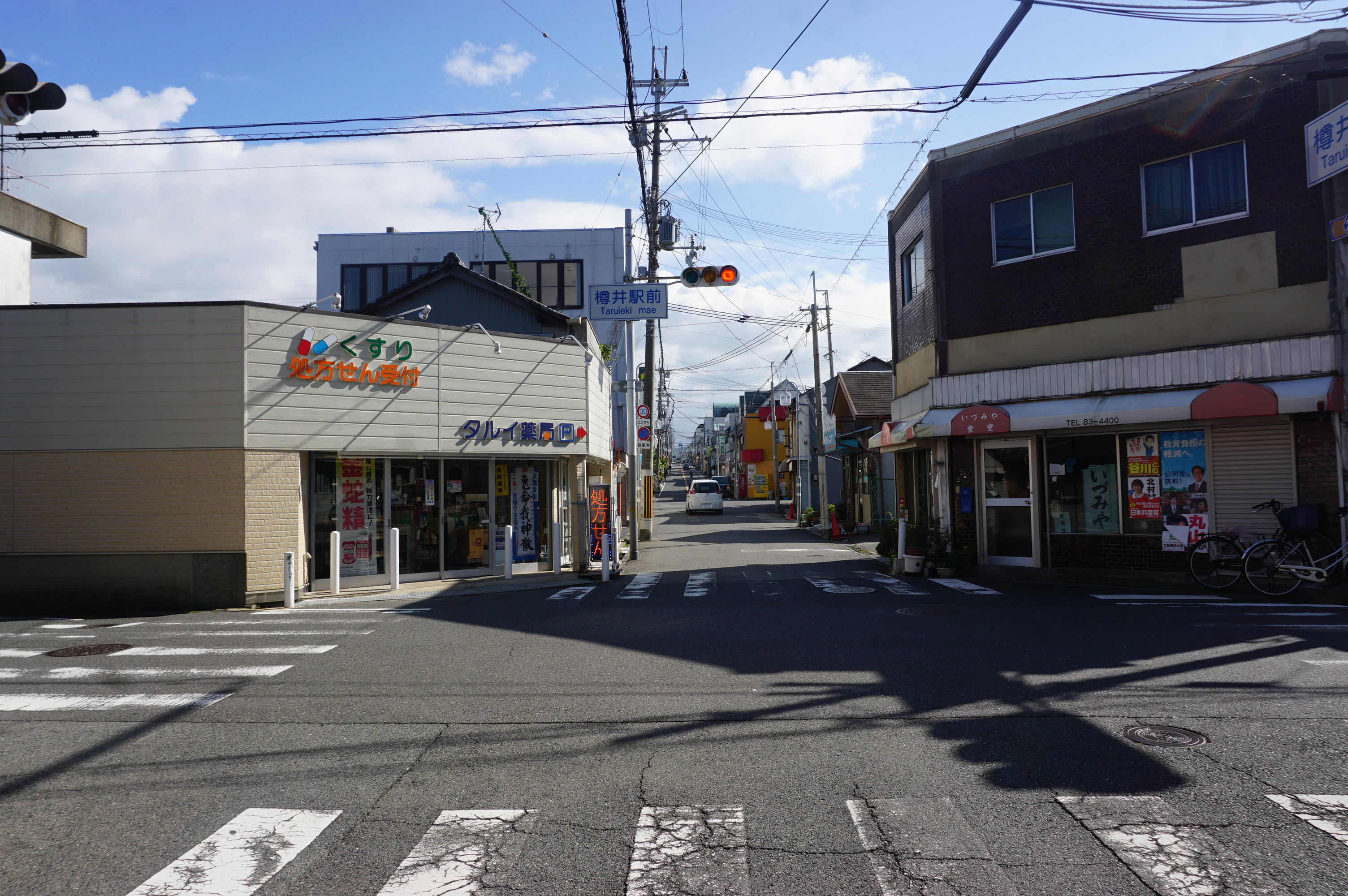 樽井駅前交差点